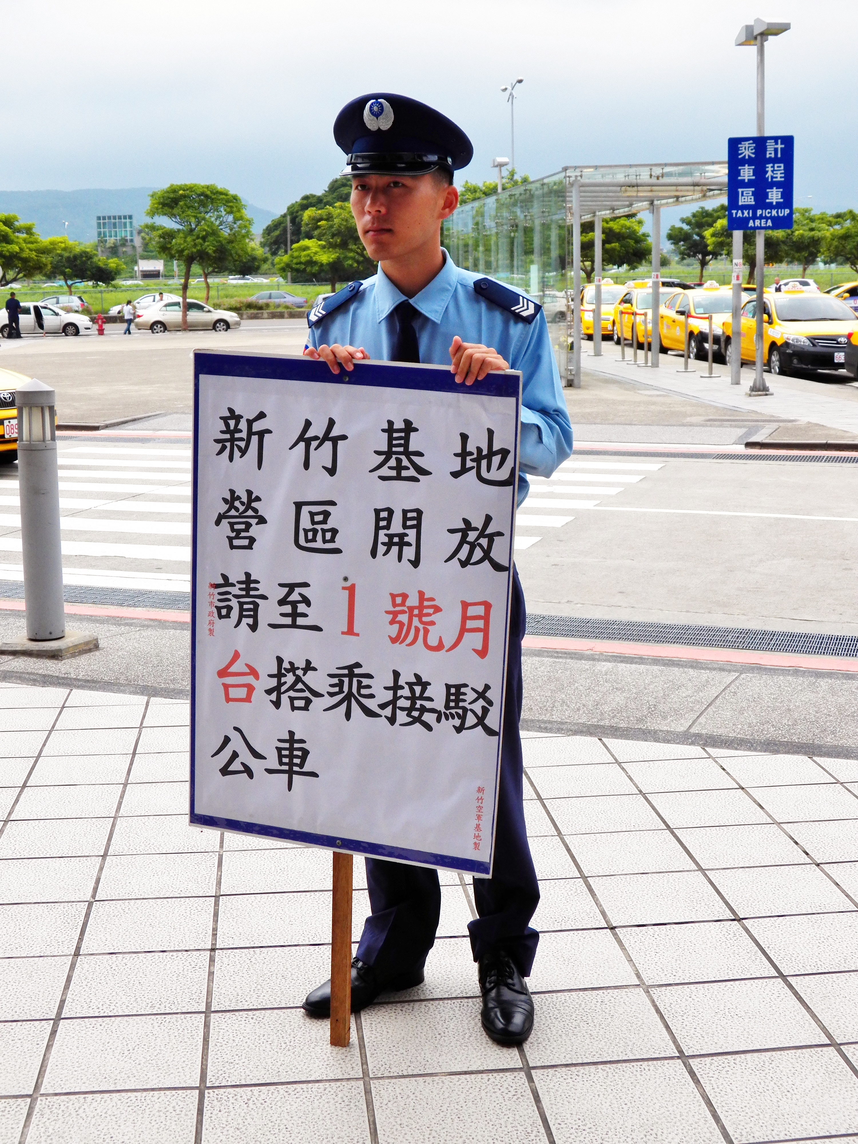 2012年空軍新竹基地營區開放活動，高鐵新竹站外手持接駁車搭乘處指示板的空軍中士。